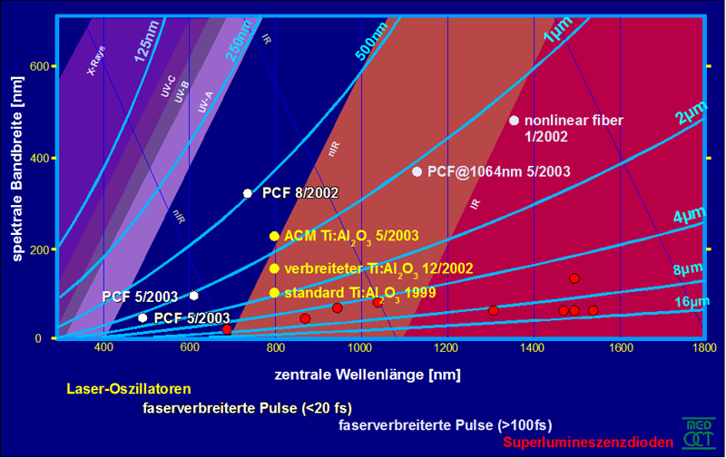 axiale Auflösung in der OCT Beispiele unterschiedlicher Lichtquellen - Ursprung: medOCT-Gruppe, Zentrum für biomedizinische technik und Physik, Med. Univ. Wien, Austria, 2005